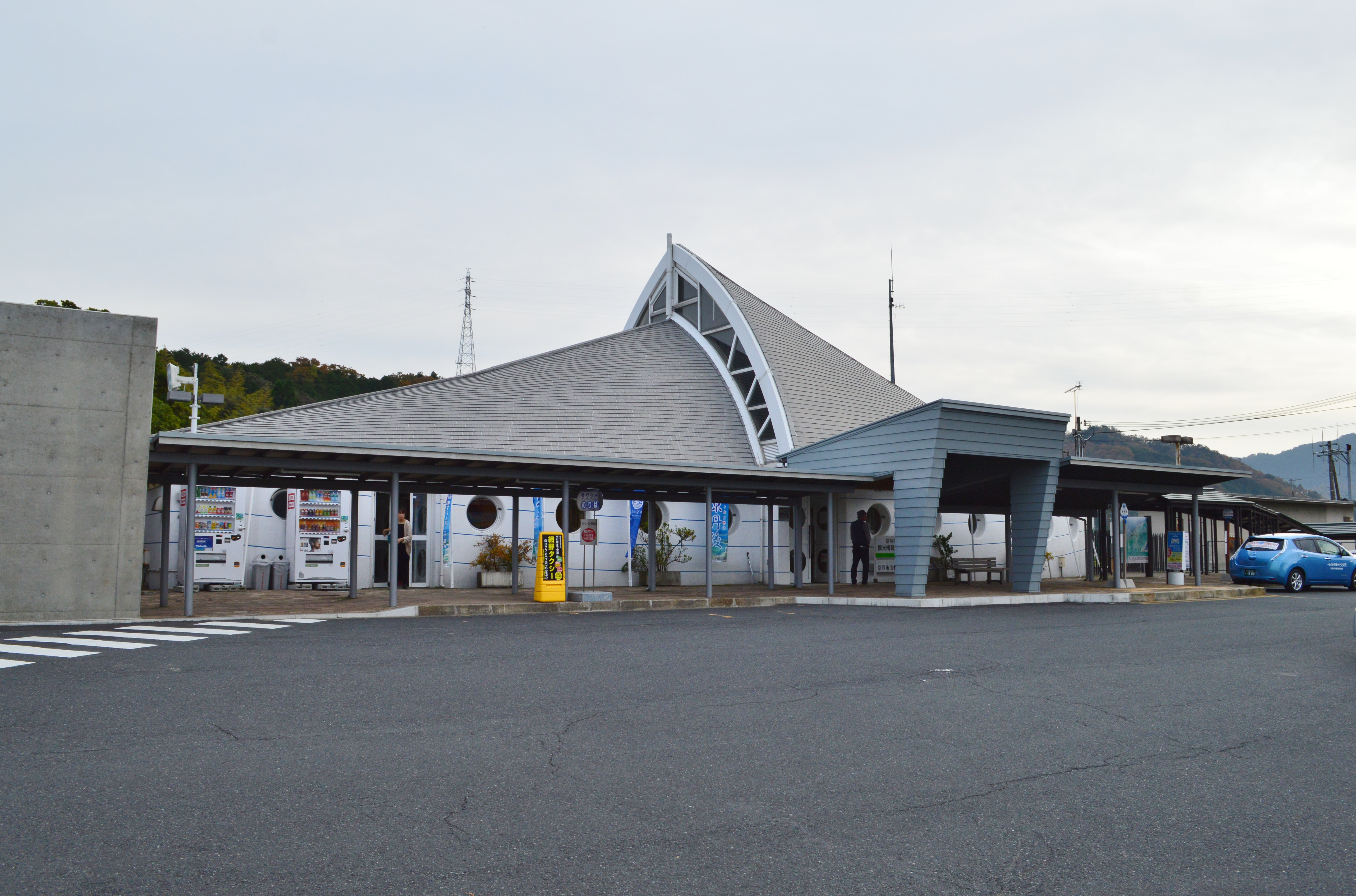 網野駅 駅舎